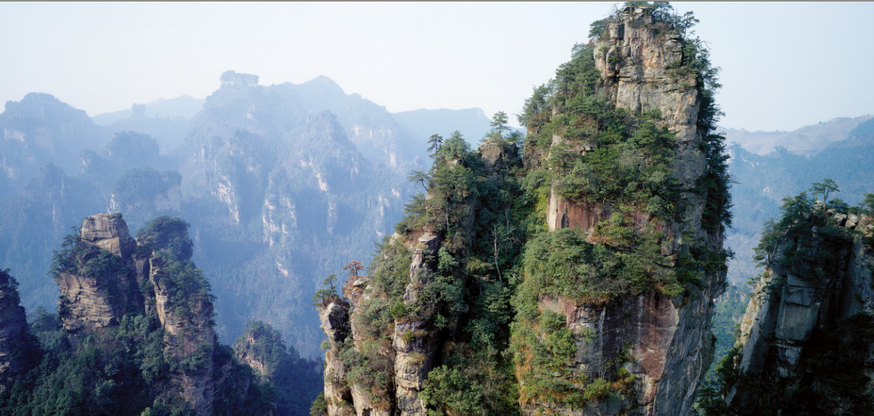 中文（中国大陆）: 张家界砂岩峰林形态